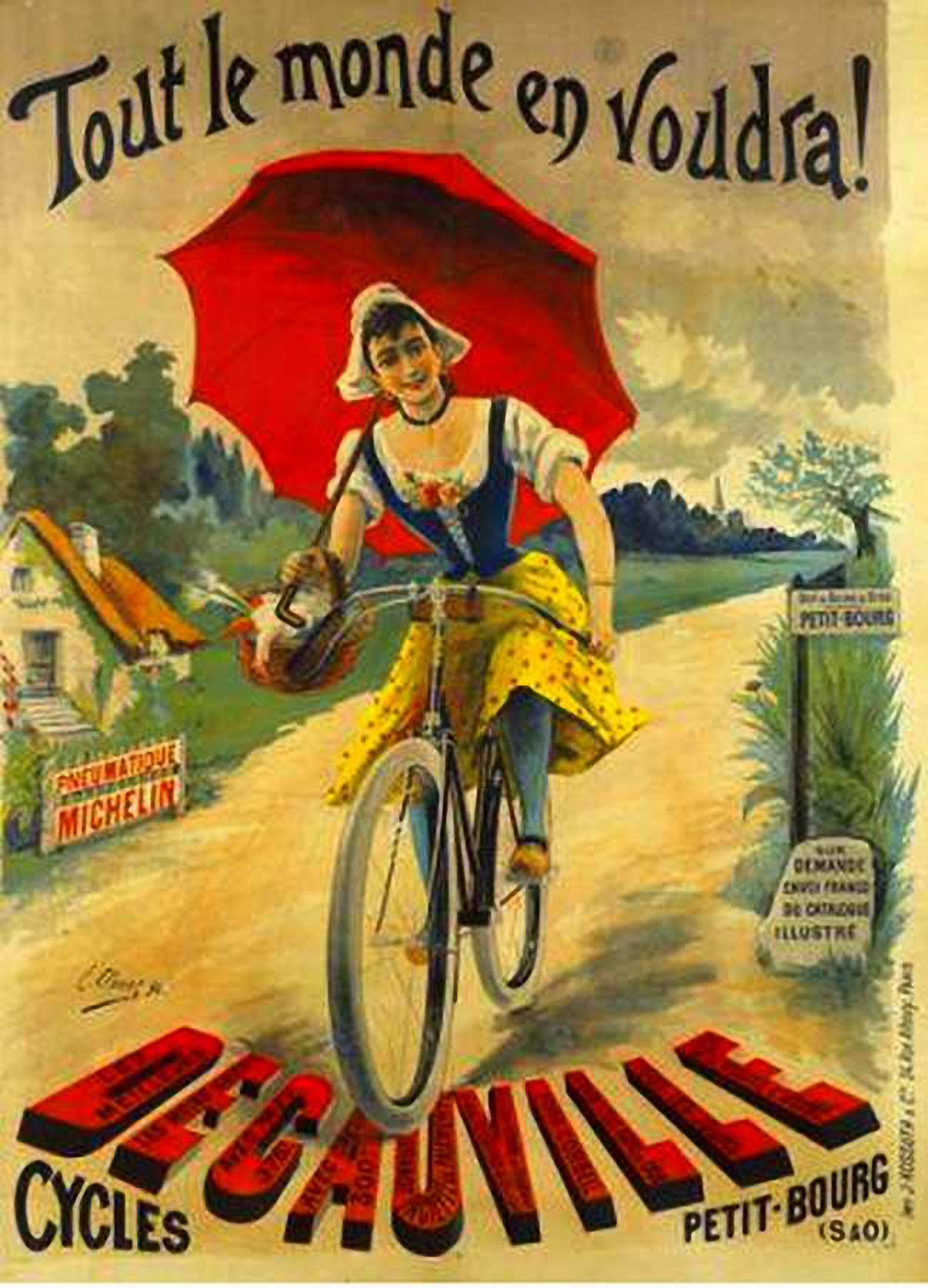 Werbeplakat für Fahrräder der Marke Decauville